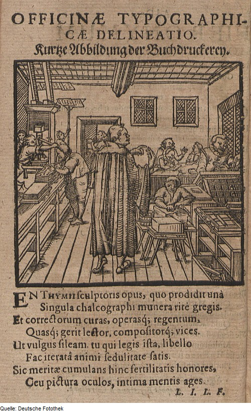 Original image description from the Deutsche Fotothek Buchdruck & Druckverfahren